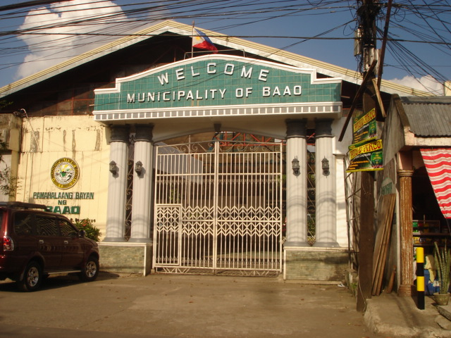 Baao, Camarines Sur, Philippines